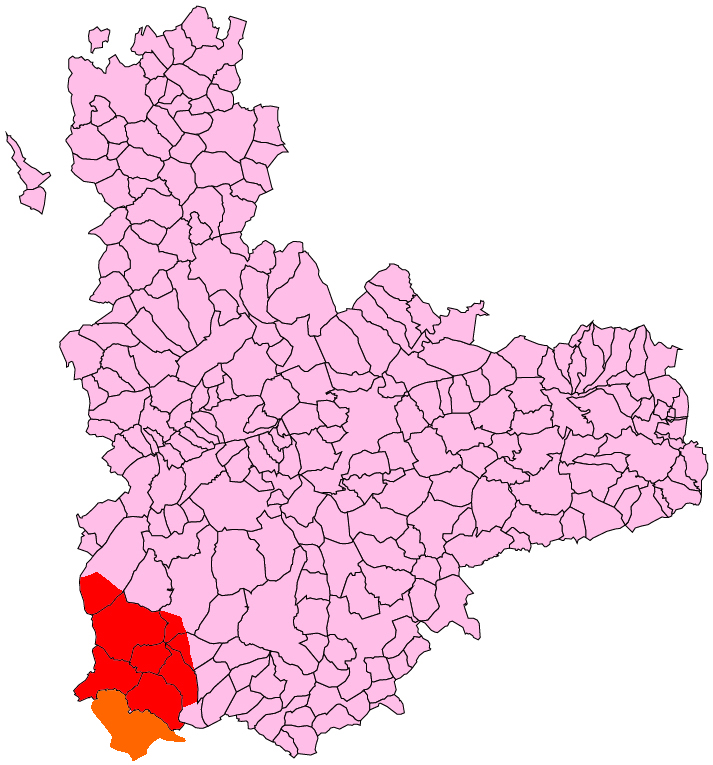 ZEPA Tierra de Campiñas (Castilla y León) Zona: Tierra de Campiñas (Valladolid, Salamanca, Ávila) Superficie: 139.445 hectáreas Localidades de referencia: Medina del Campo, Alaejos, Madrigal de las Altas Torres, Cantalapiedra Hábitats característicos: Llanura cerealista, pinares, sotos, humedales, pastizales Especies por las que se declara la ZEPA: Avutarda, Cigüeña común, Milano real, Aguilucho cenizo, Cernícalo primilla, Grulla común, Sisón, Ortega, Ganga común Otras especies de interés: Aguilucho pálido, Alcotán, Esmerejón, Ciguñuela, Alcaraván Centro de visitantes: Centro del Cernícalo Primilla en Madrigal de las Altas Torres, gestionado por la Sociedad Española de Ornitología/Birdlife International Época aconsejada de visita: Todo el año Código: ES000204 verLista de aves